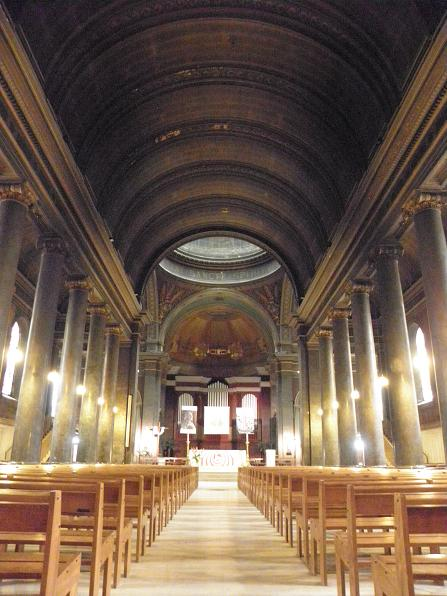 Intérieur de l'église St-Pothin de Lyon